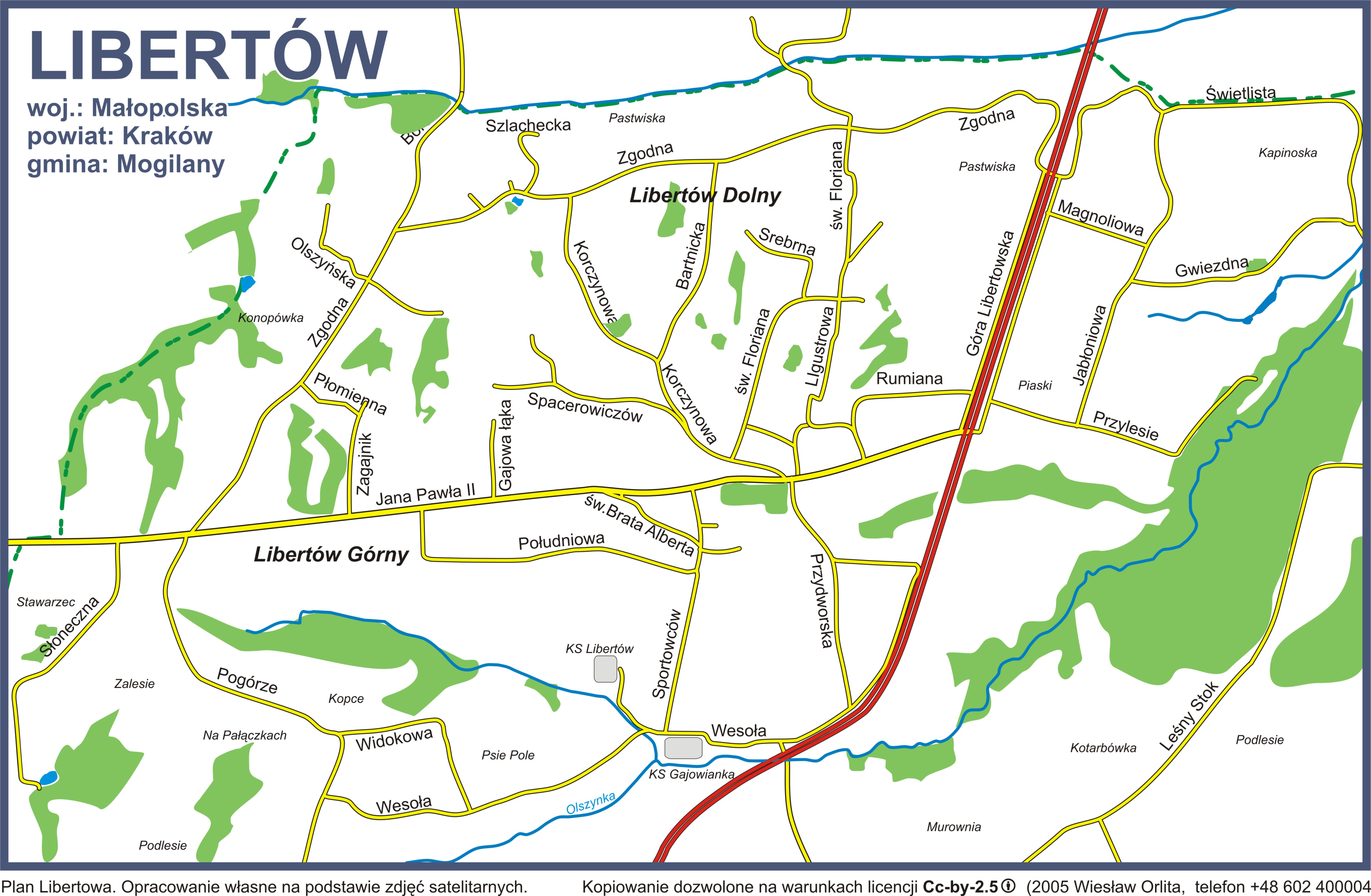 LIBRETÓW - Plan ulic